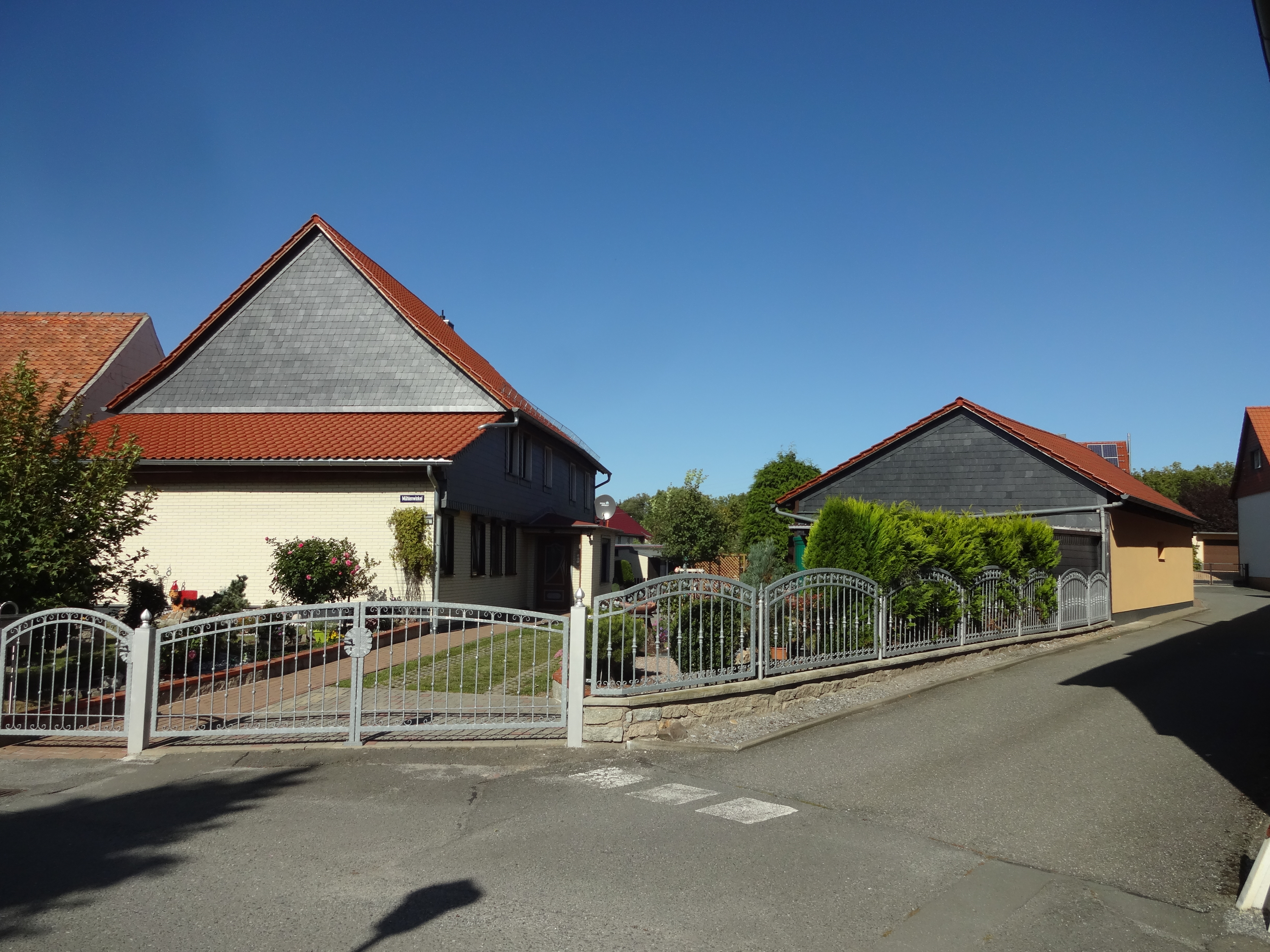 ehemals denkmalgeschütztes Wohnhaus im Mühlenwinkel 8 in Drübeck